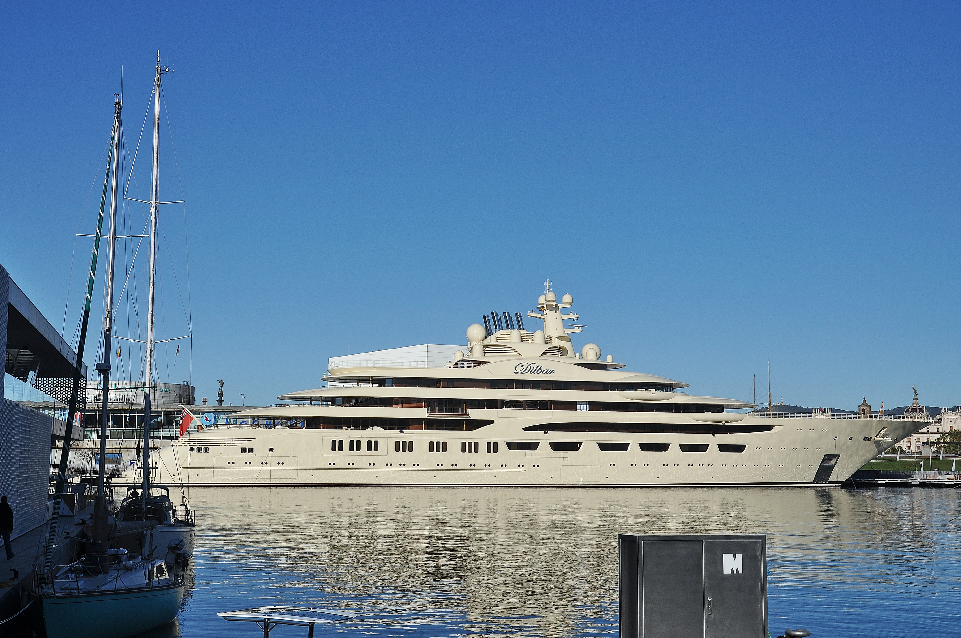 Marina Port Vell